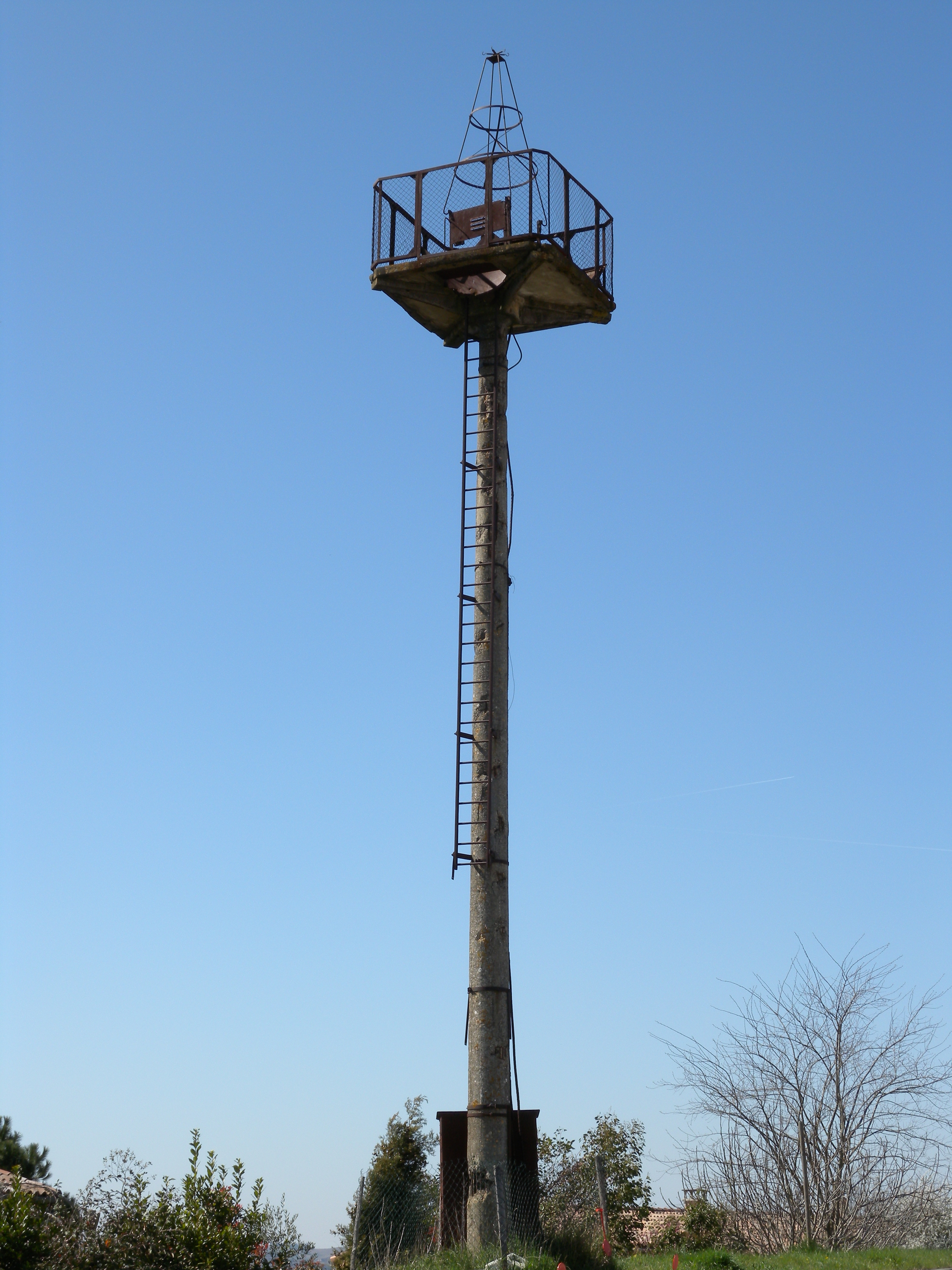 Phare aéronautique, datant des années 1925 et permettant aux avions de rejoindre les différents aéroports.